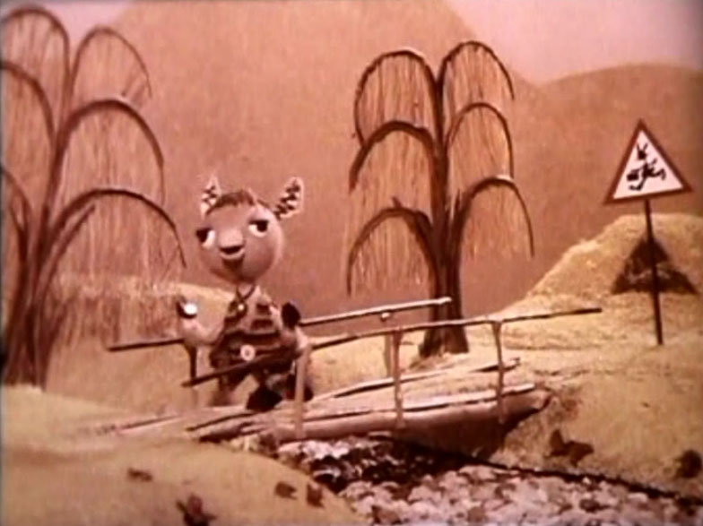 Кадр из первого армянского кукольного фильма "Неправильное выражение".